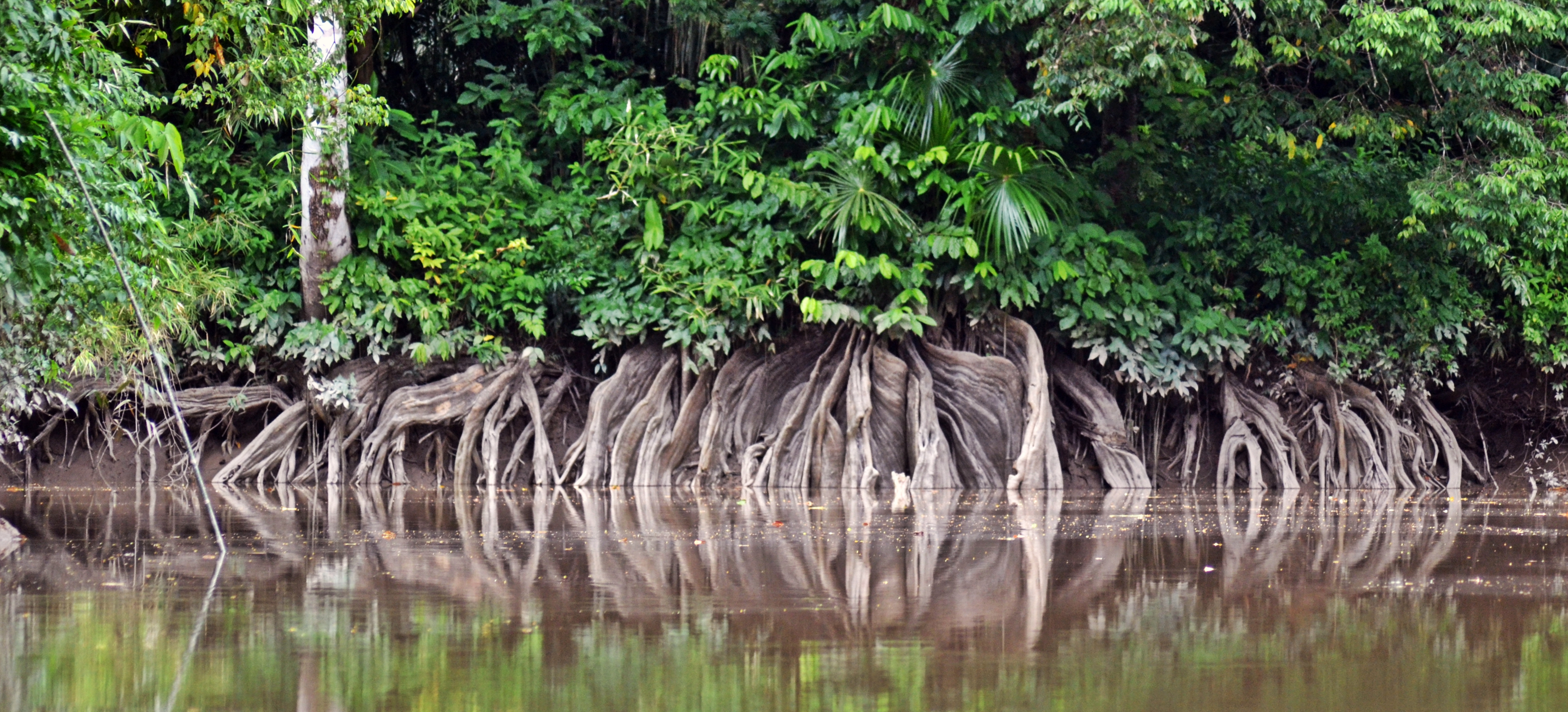 Floresta de várzea na Ilha de Marajó